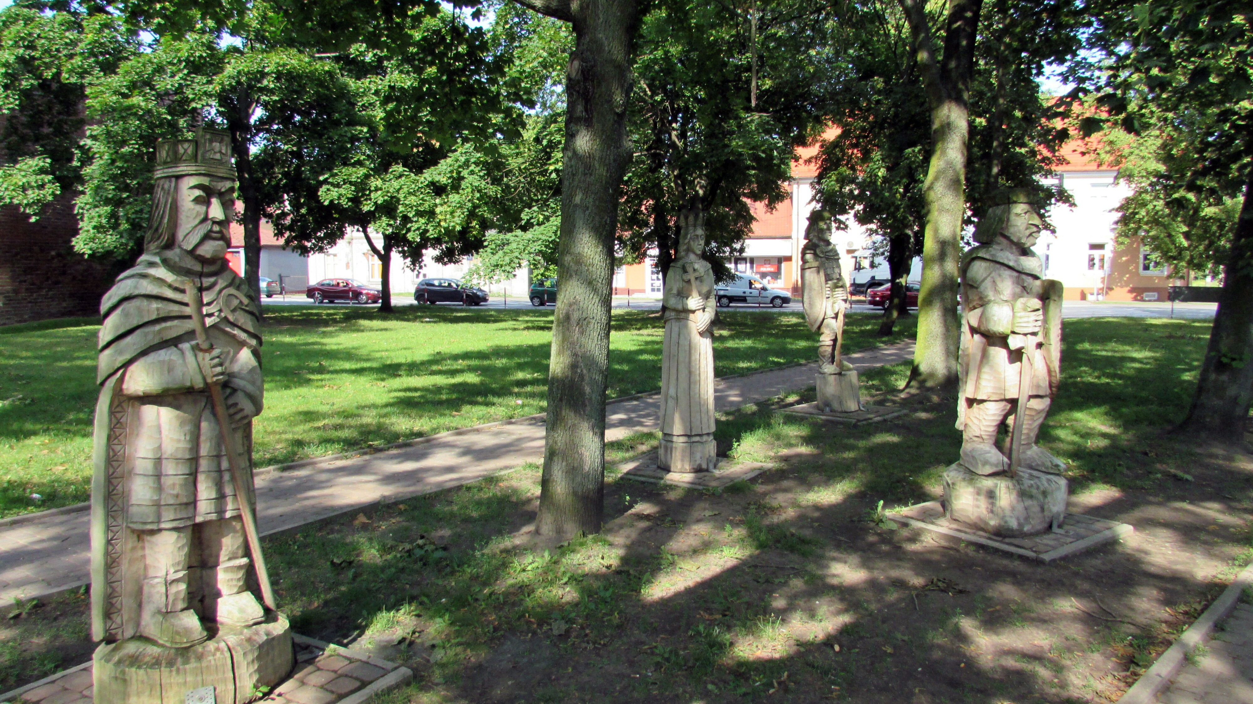 Leczyca Holzfiguren